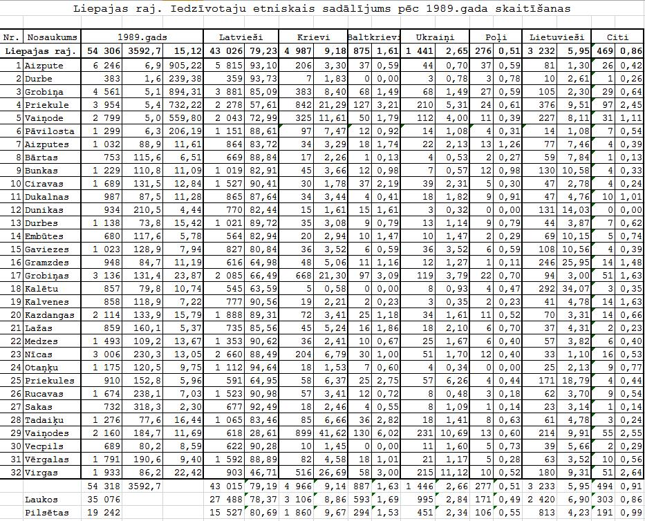 Этнический состав населения Латвии по переписи 1989 года